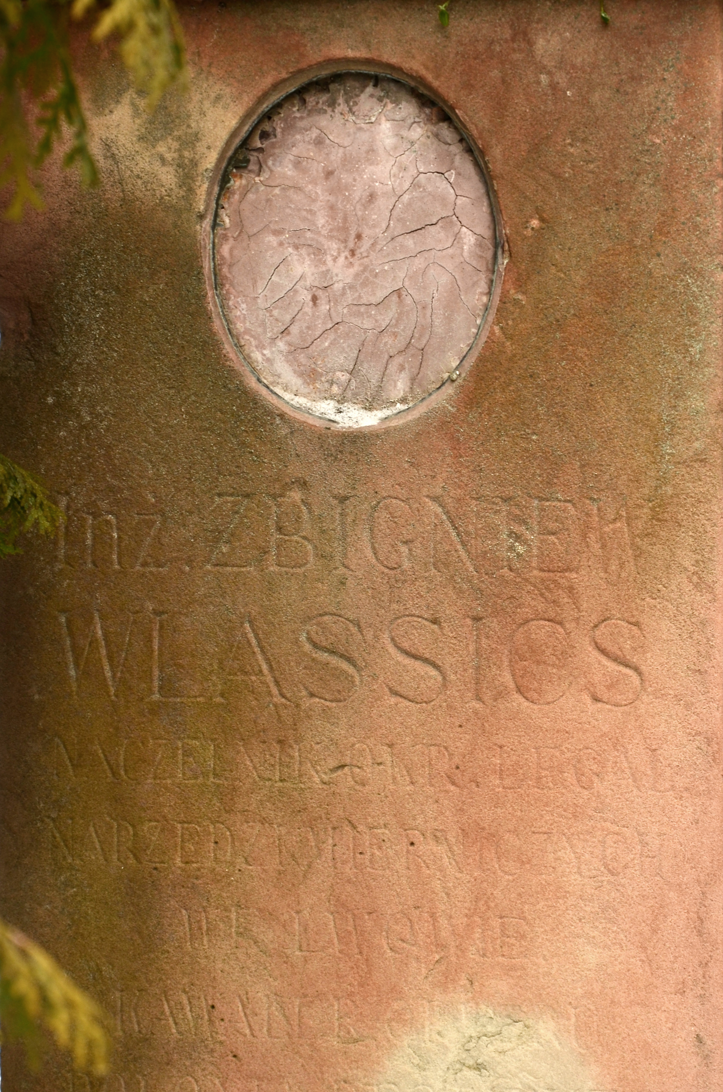 Гробівець родини інженера Збігнева Власича.